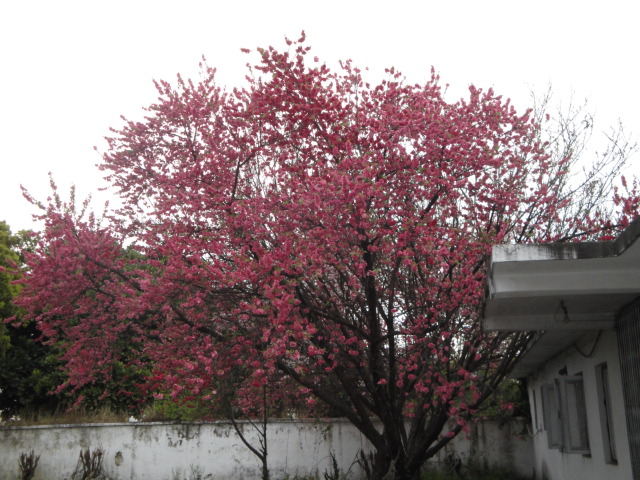 नेपाली: आरुको फूल